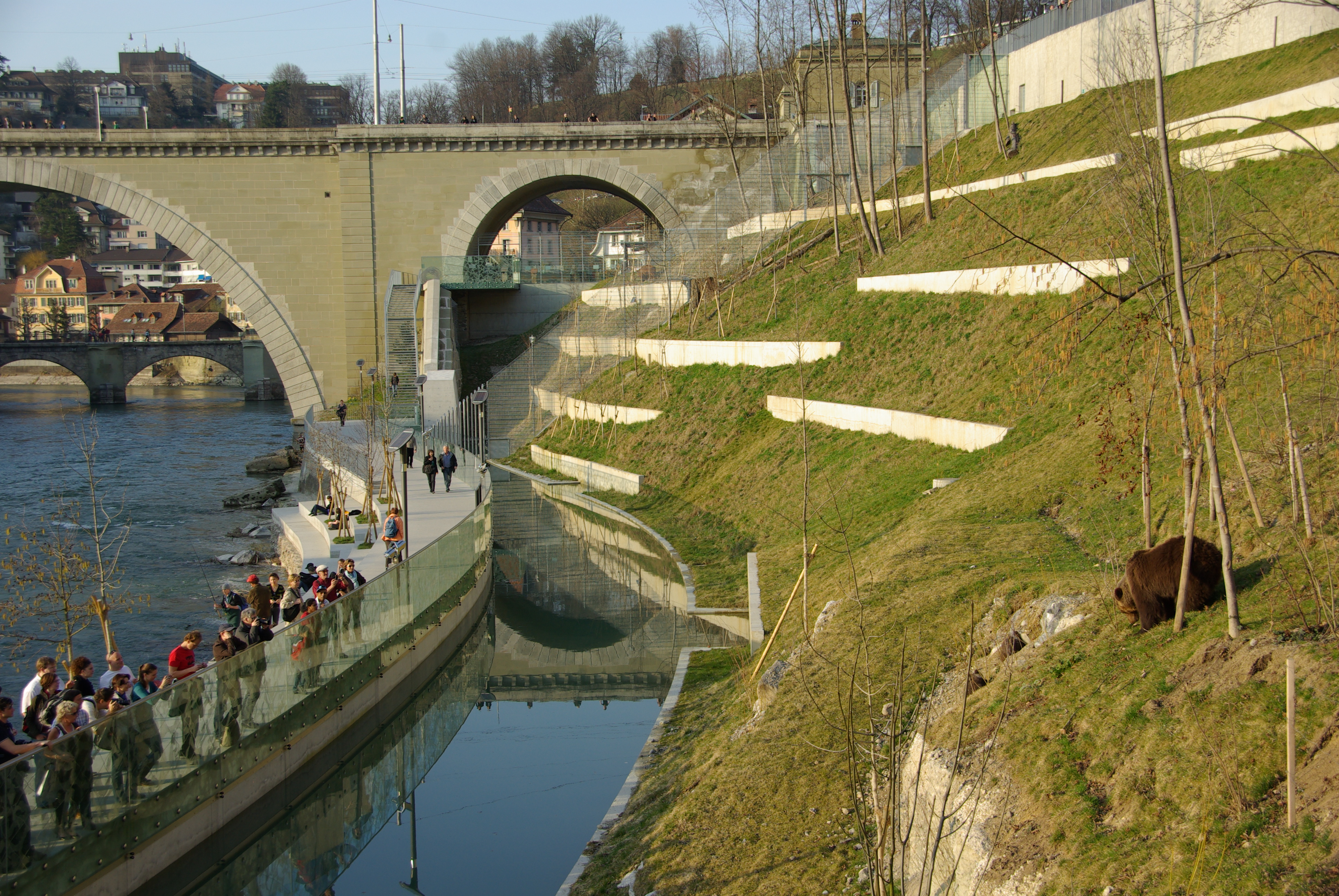 Bärenpark 2010